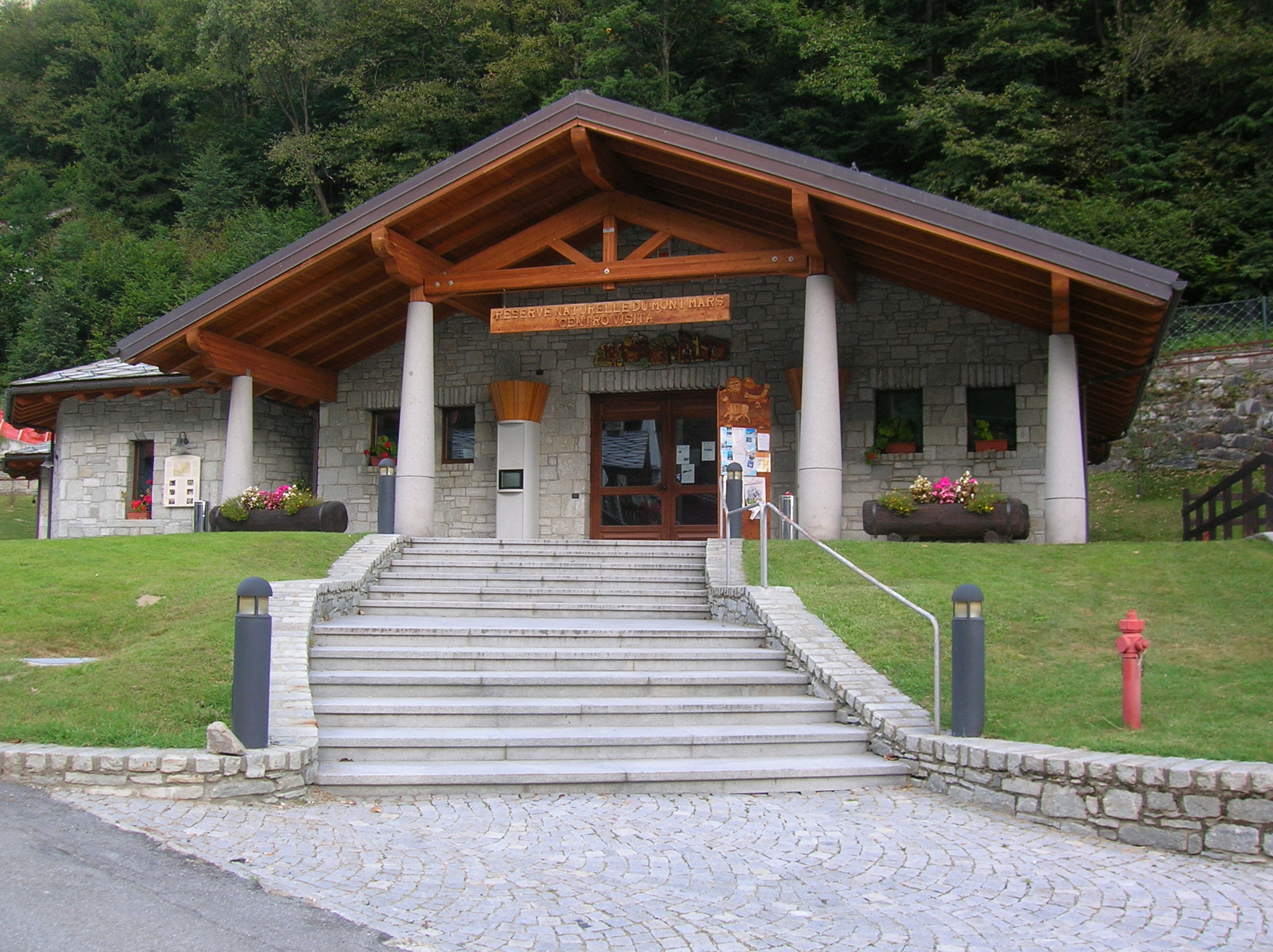 Centro visite, Riserva naturale Monte Mars, Fontainemore, Valle d'Aosta, Italia.